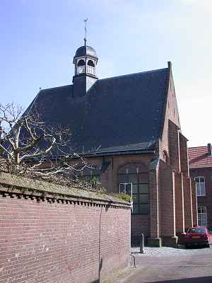 Garnizoenskerk Ravenstein